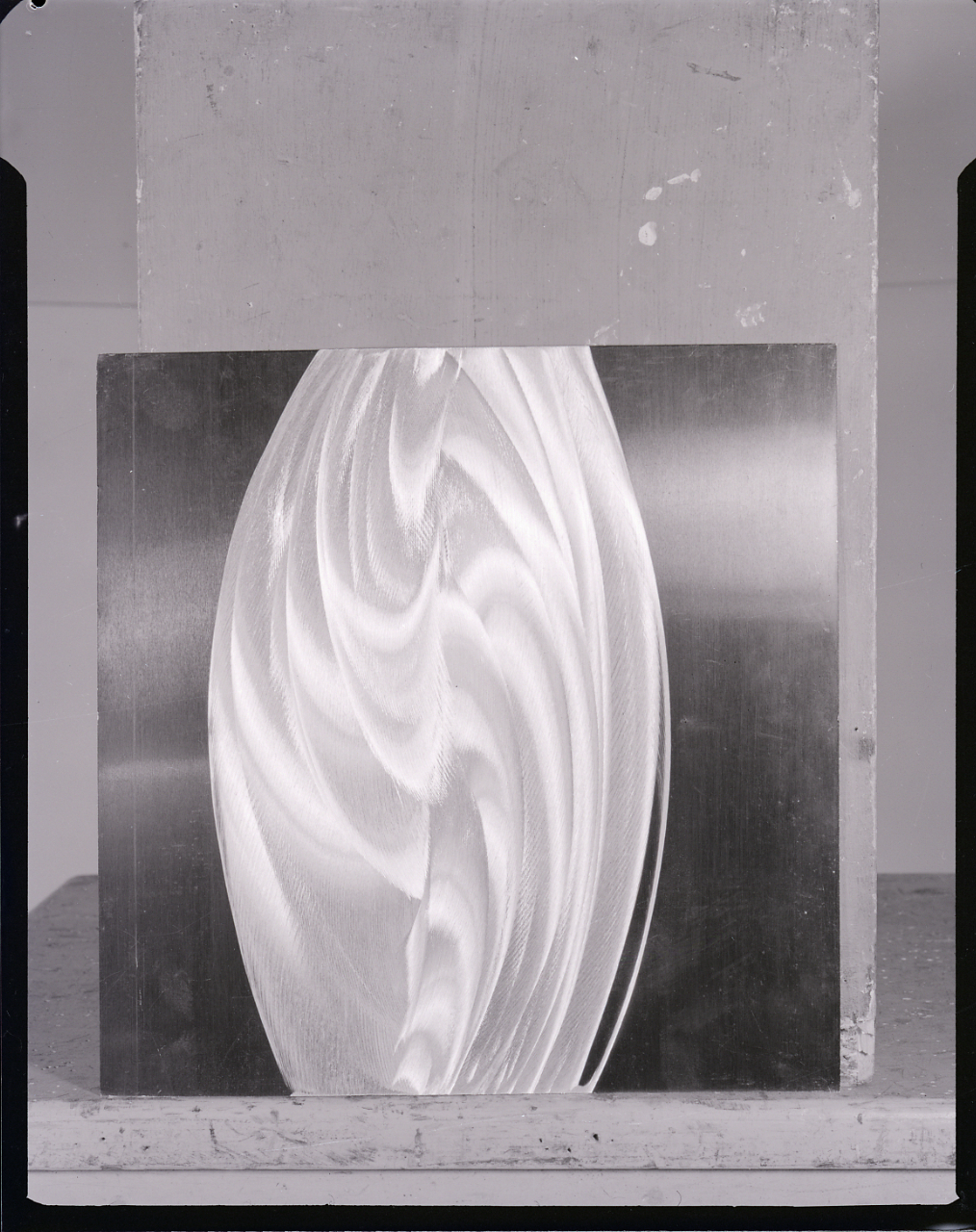 Servizio fotografico : Italia, 1963 / Paolo Monti. - Buste: 12, Fototipi: 12 : Negativo b/n, gelatina bromuro d'argento/ pellicola ; 10x12. - ((Serie costituita da 12 buste sciolte di negativi identificati con una doppia numerazione (da 42951 a 42967): 24241, 24242, 24243, 24244, 24245, 24246, 24247, 24248, 24249, 24250, 24251, 24252. - Sulla busta identificata con il n. 24241 iscrizione didascalica manoscritta a penna. - La doppia numerazione potrebbe corrispondere ai lavori realizzati durante il periodo di attività del laboratorio e studio fotografico "Foto Studio 22", società che risulta essere stata aperta il 10/04/1961, con partecipazione, nel ruolo di gerente, di Vincenzo Carrese. - Fonte: Rubrica di Paolo Monti: Archivio fino 1-4-1961/ 31-3-1963 (1961-1963), presso Archivio Paolo Monti